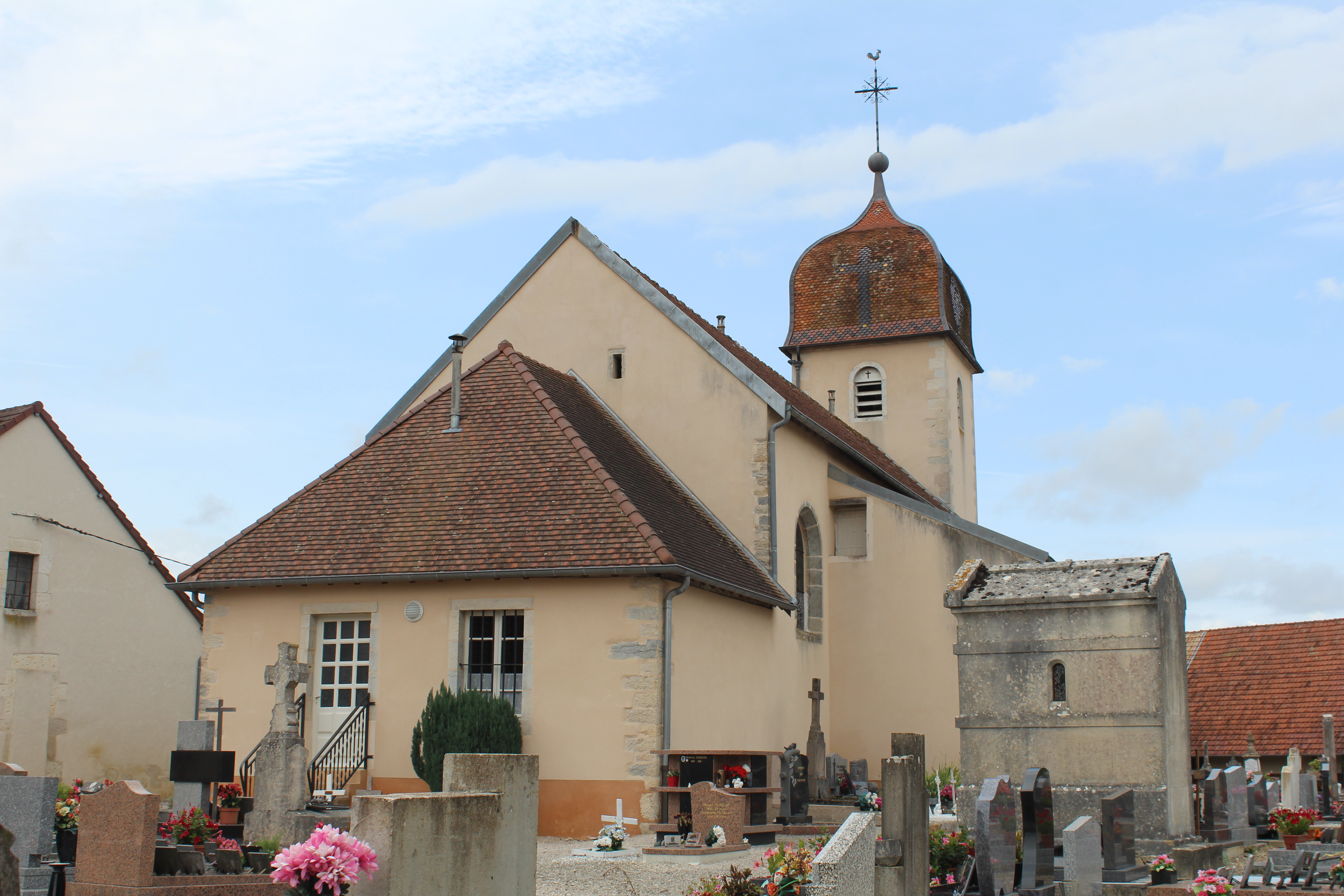 Église Saint-Étienne de Villers-les-Bois.